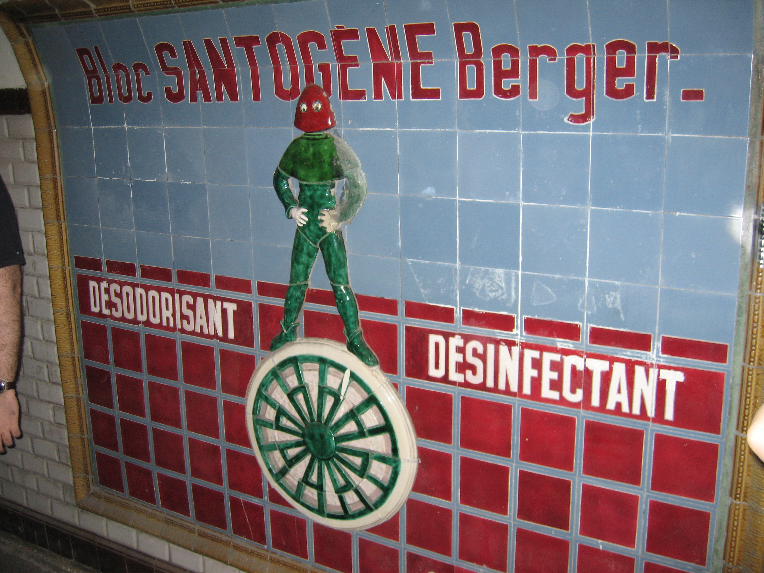 Journées du patrimoine RATP 16-17/09/2006. Publicité Santgène à Saint-Martin.